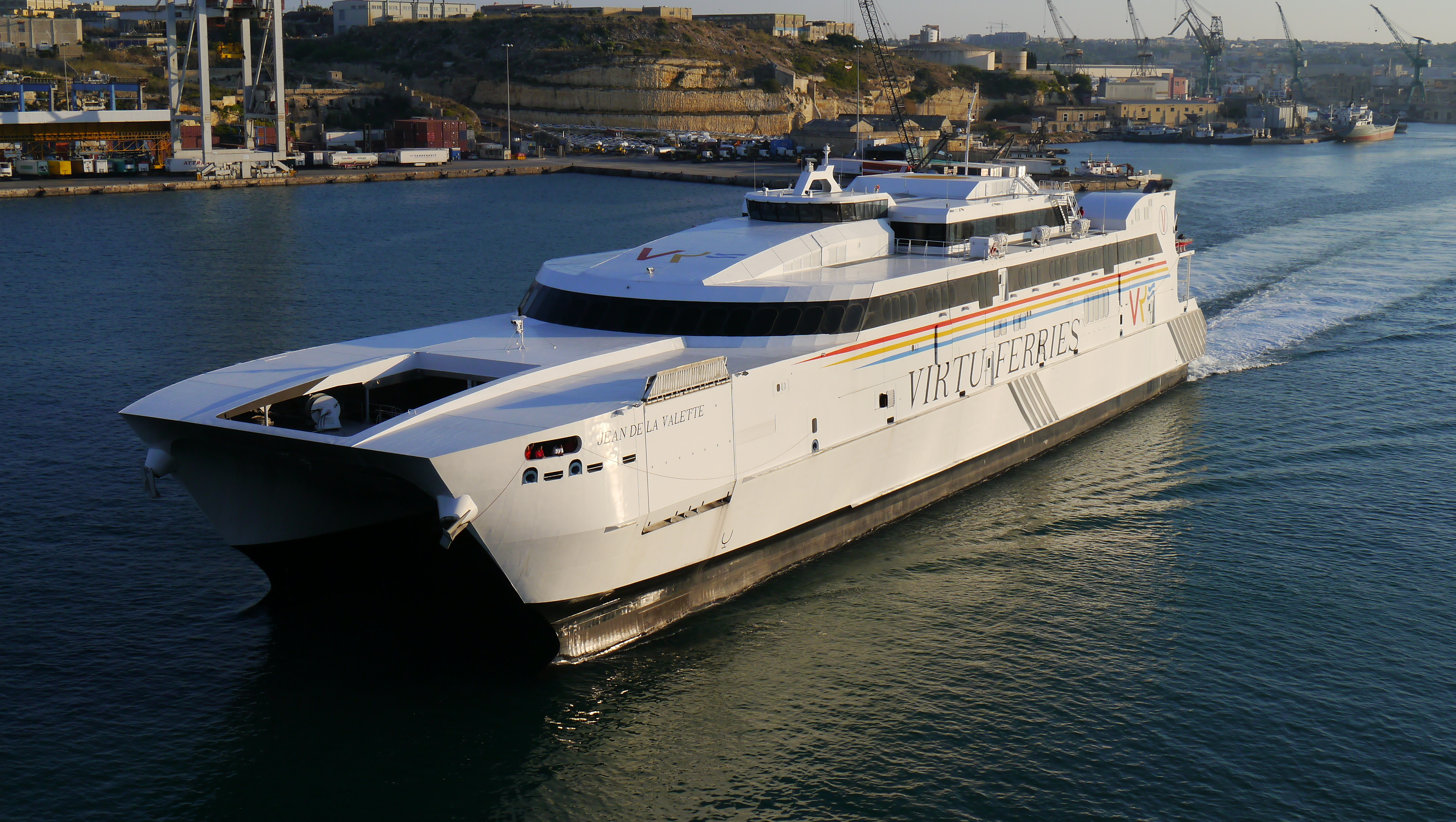 Katamaranfähre Jean de la Valette in Valetta / Malta IMO Number: 9559743 MMSI Number: 249898000 Callsign: 9HA2063 Length: 107 m Beam: 27 m